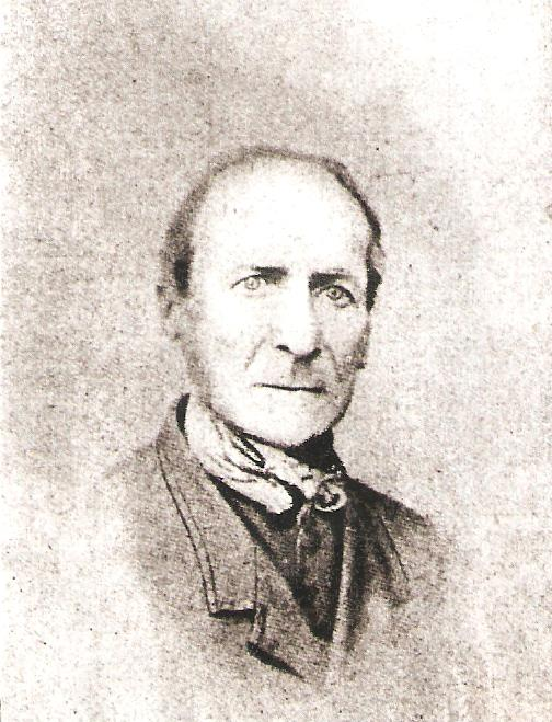 Louis Frederik Johannes Rosenveldt (Rotterdam, 15 februari 1798 - aldaar, 21 juli 1867) was een Nederlands acteur en schouwburgdirecteur. Uit familie-album als achter-achter-kleinzoon